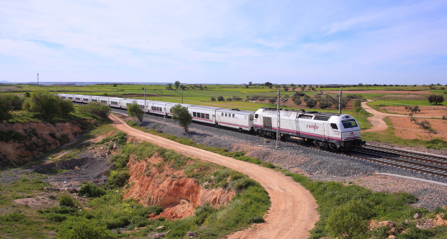 Talgo Altaria Madrid-CH a Murcia y Cartagena. El Romeral.